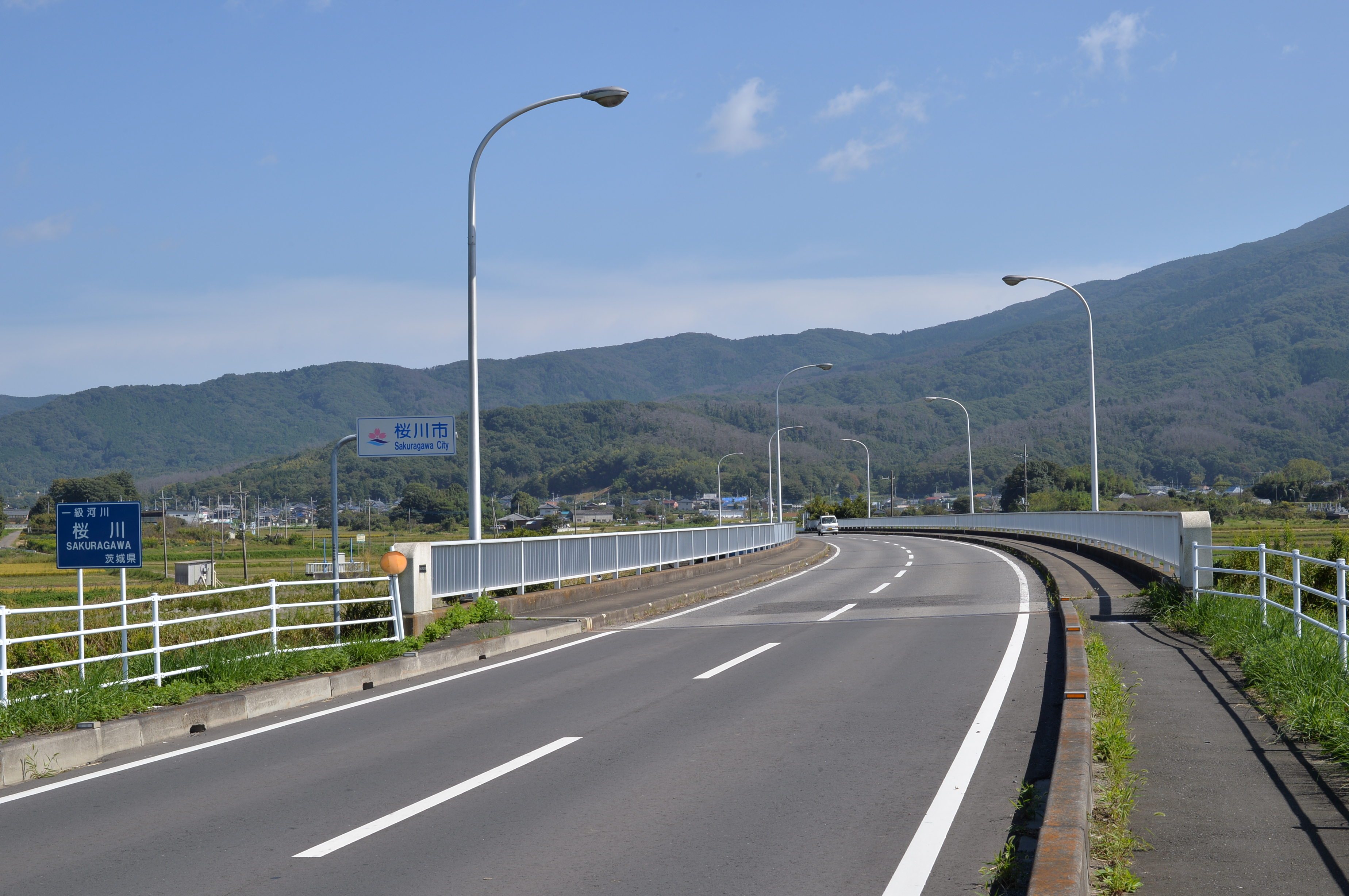 桜川に架かる中村橋（茨城県道148号東山田岩瀬線）